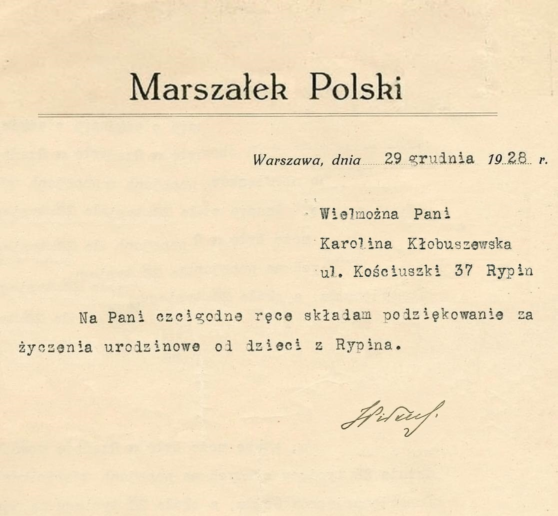 Podziękowanie od Marszałka Józefa Piłsudskiego za życzenia urodzinowe od dzieci z Rypina złożone w formie pisemnej na ręce Karoliny Kłobuszewskiej.